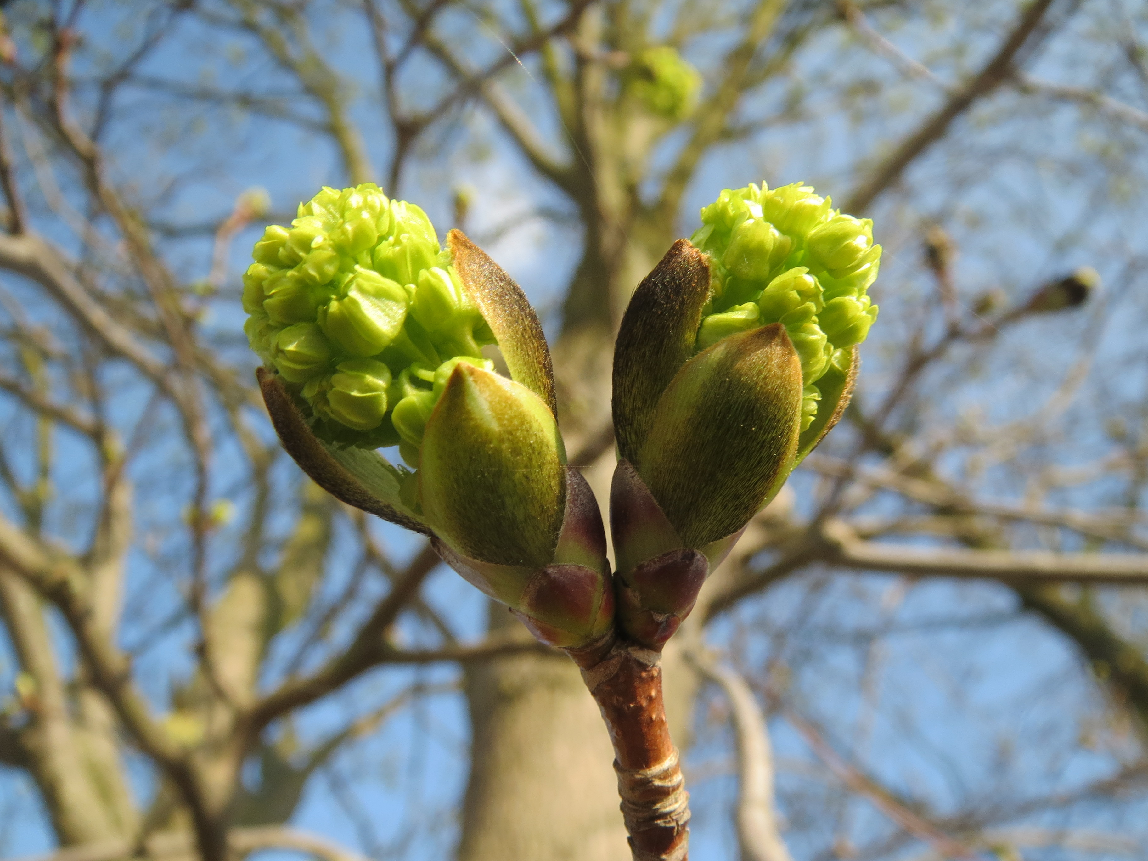 Aufspringende Knospe vom Spitzahorn (Acer platanoides) im Hockenheimer Rheinbogen